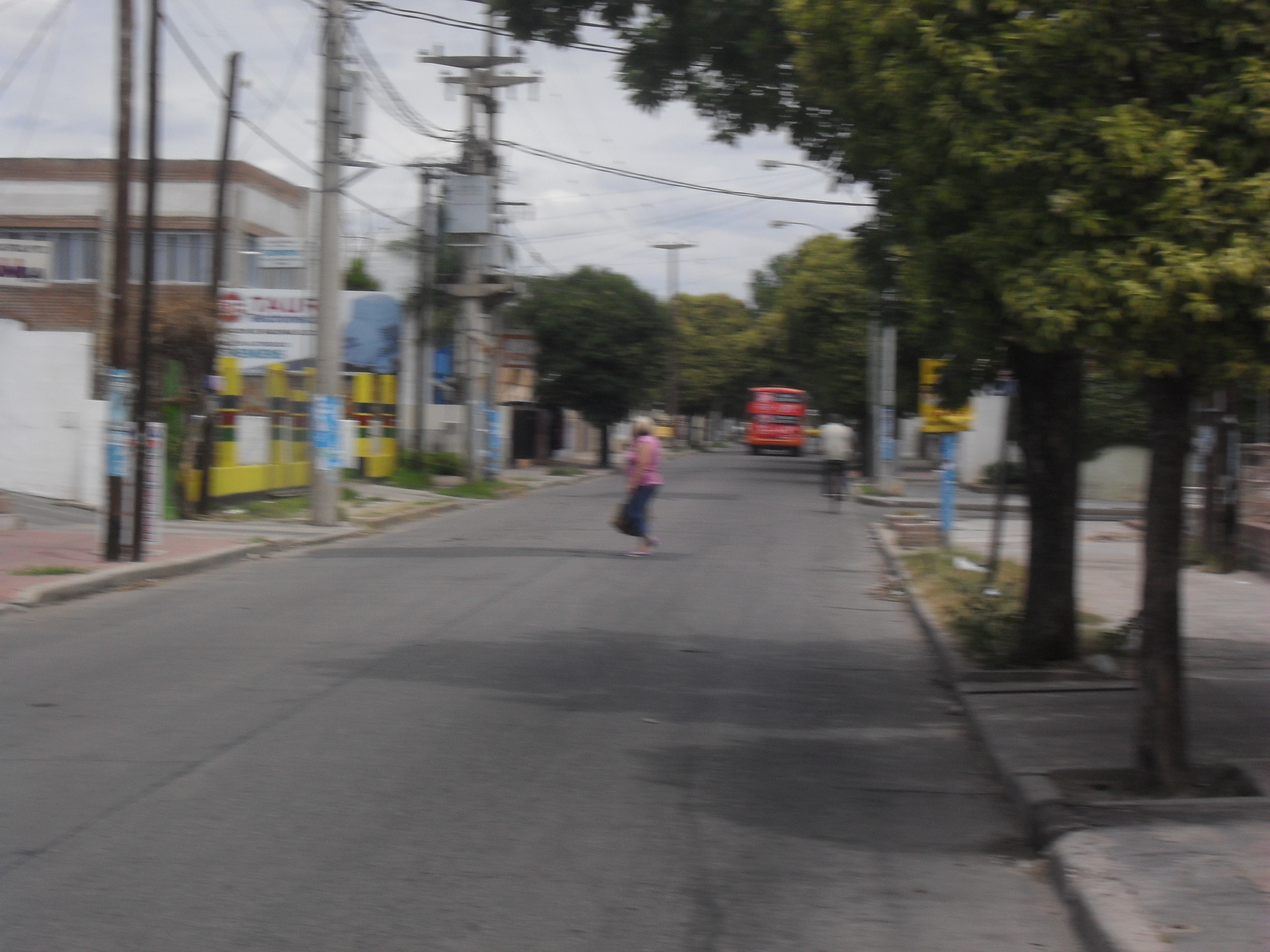 Vista de la calle Luis Agote hacia el oeste